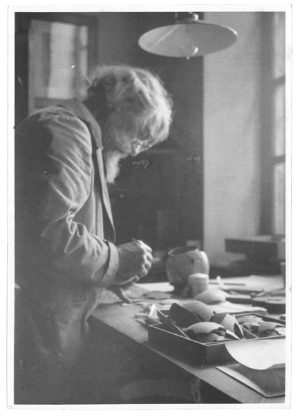 Luis Siret. Número de inventario: 1973-58-FF-10675.